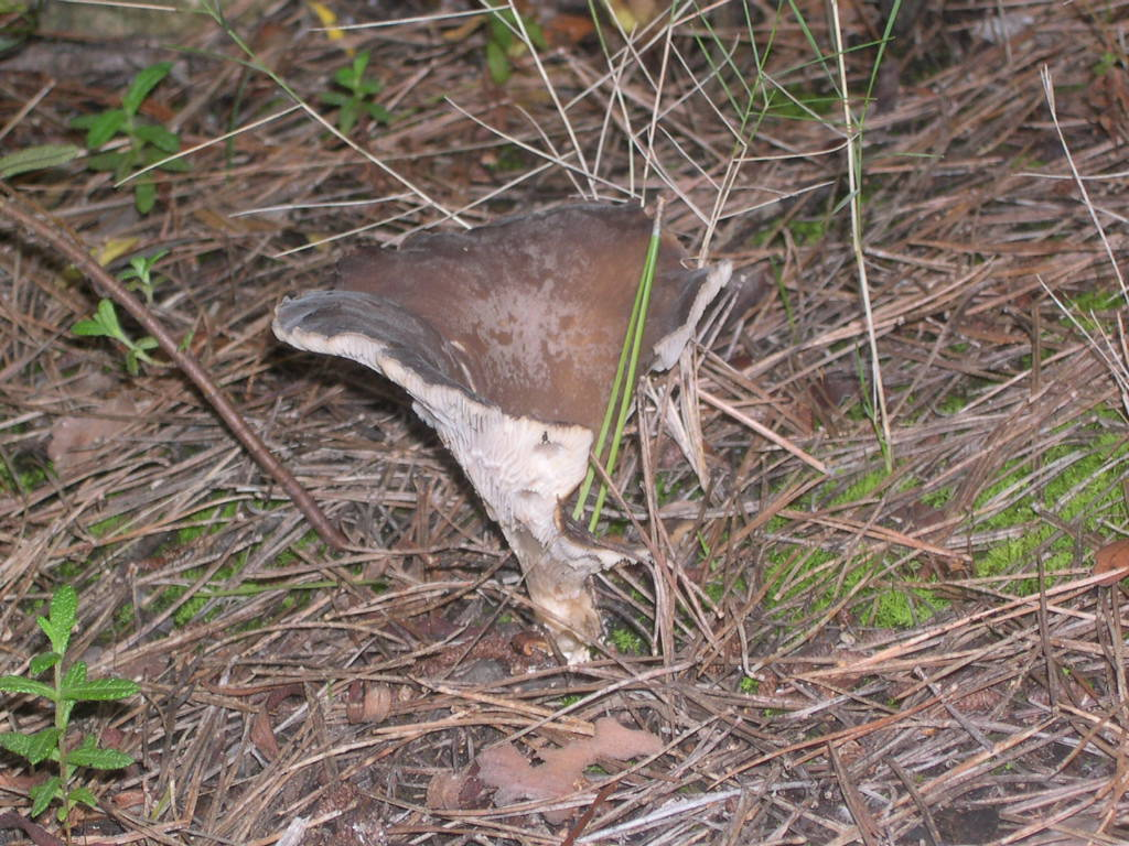 Gírgola de pi (Hohenbuehelia geogenia), Mallorca.